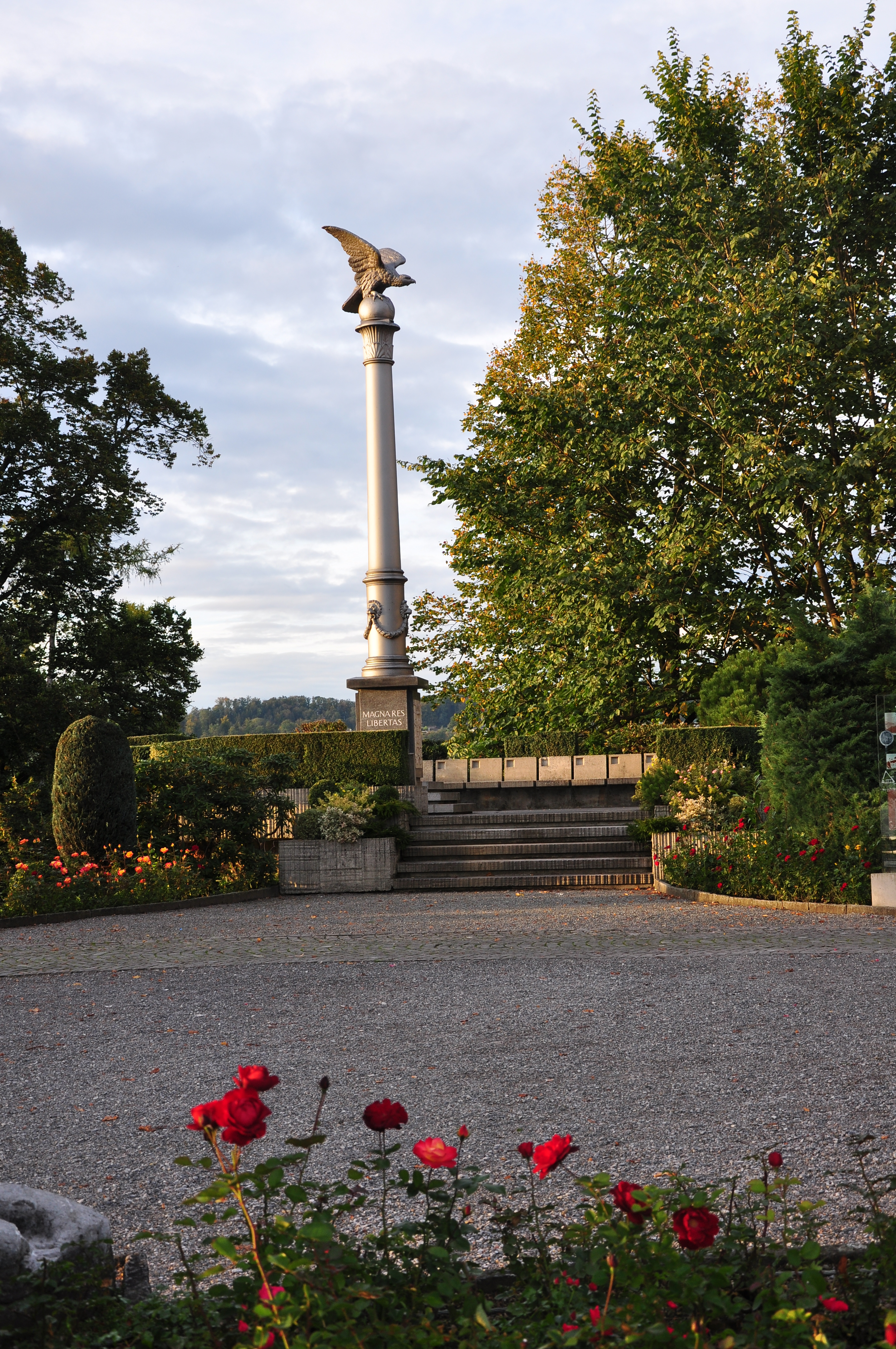 Polnische Freiheitssäule in Rapperswil (Switzerland) on the eastern side of Schloss Rapperswil